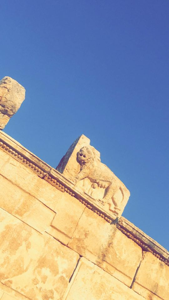 صورة توضح نقش الأسد في منطقة عراق الأمير في الأردن